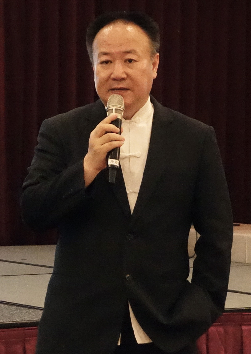 新書發表會現場